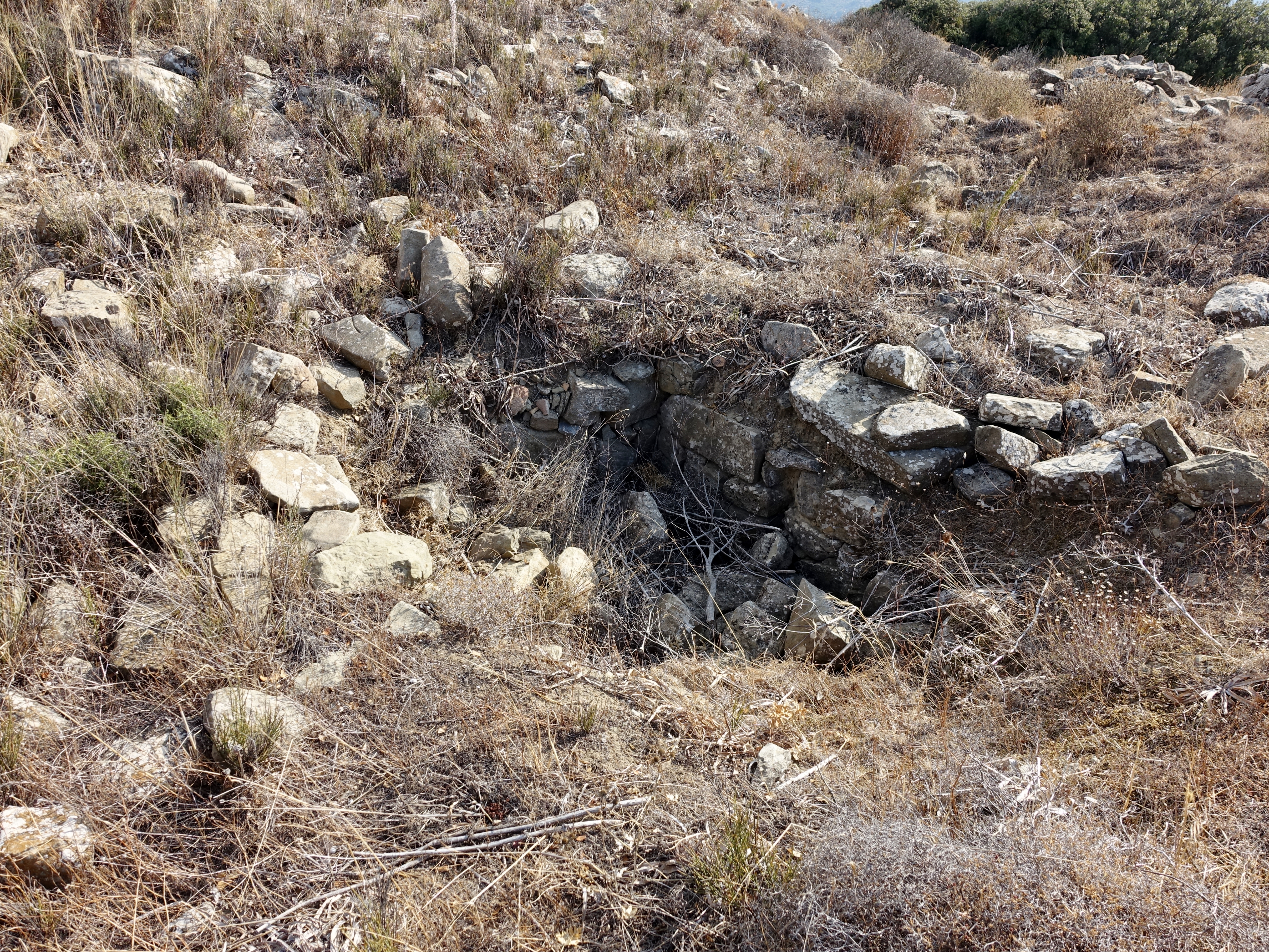 Lage der antiken Stadt Arkades oder Arkadia bei Afrati (Αφράτι), Gemeinde Viannos, Regionalbezirk Iraklio, Kreta, Griechenland